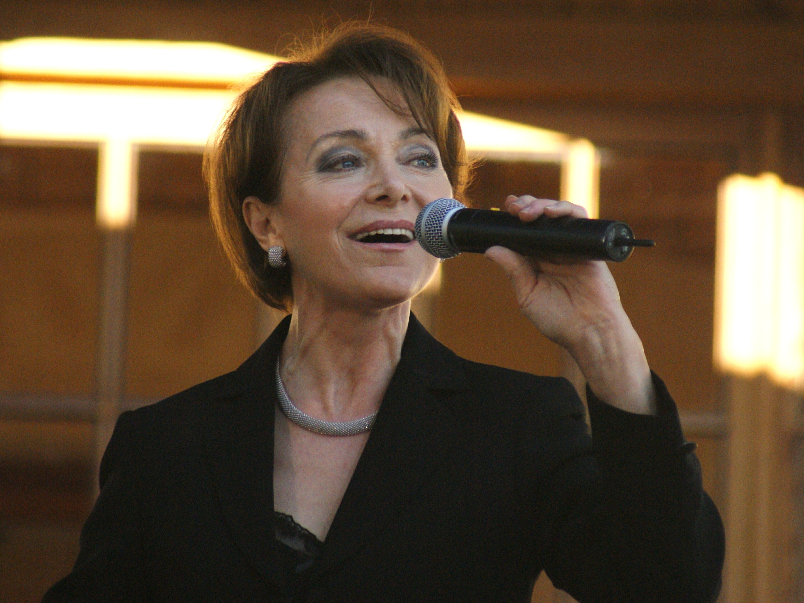 Irena Jarocka.